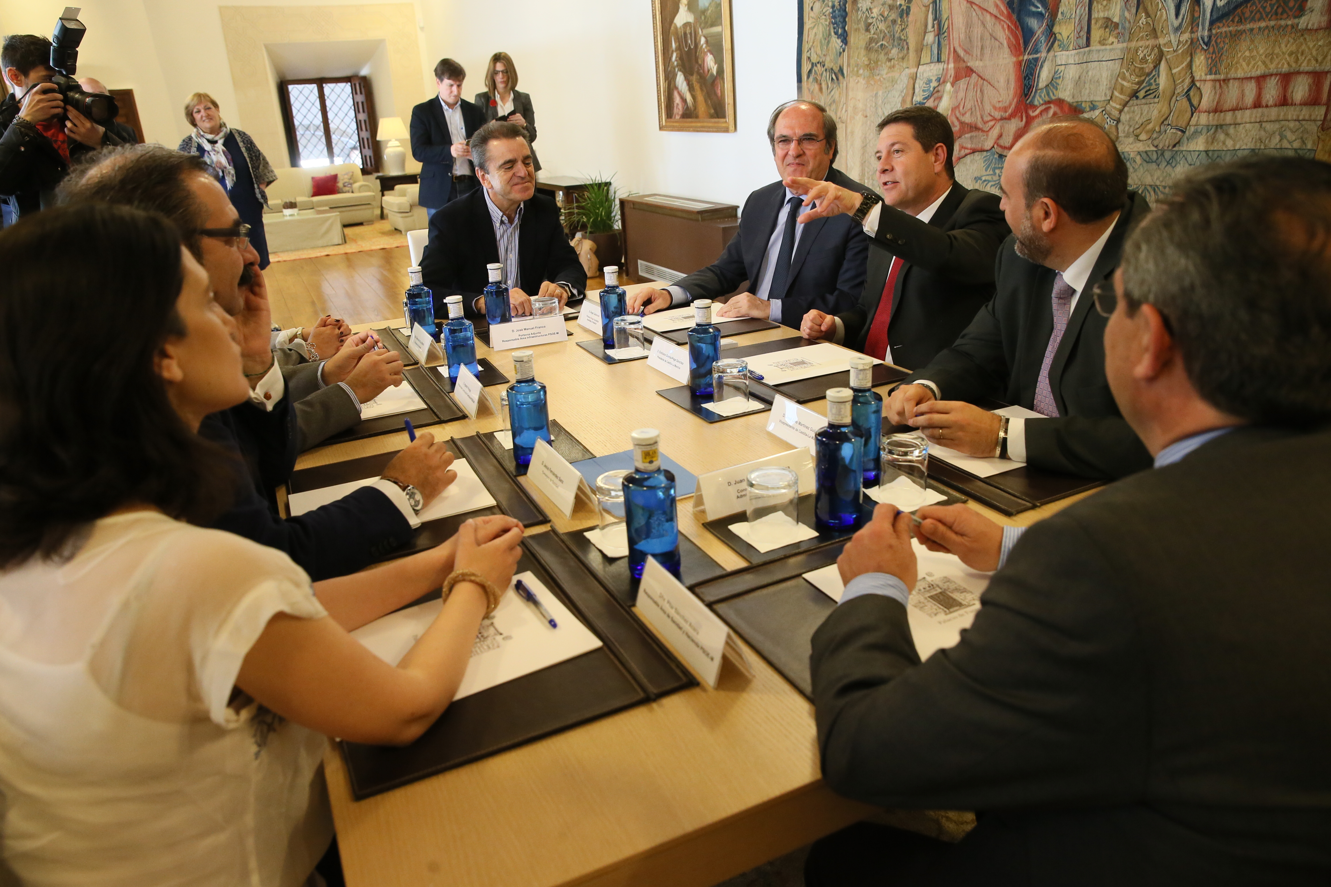 Toledo, 16 de mayo de 2016. El presidente de Castilla-La Mancha, Emiliano García-Page, mantiene una reunión con el exministro de Educación y portavoz socialista en la Asamblea de Madrid, Ángel Gabilondo, en el Palacio de Fuensalida. (Fotos: Ignacio López//JCCM)